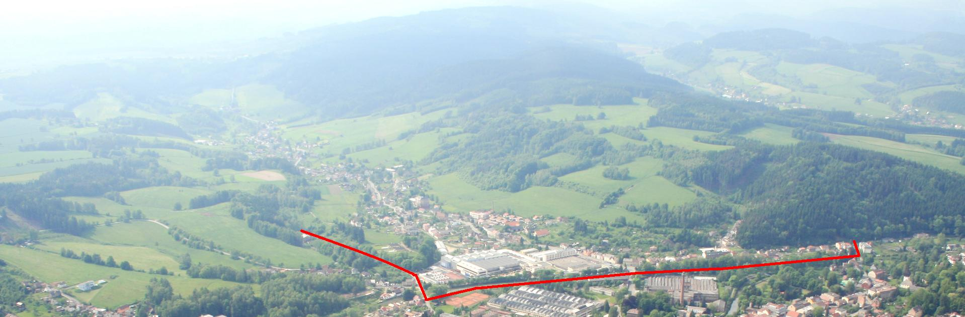 Детаил Збечника, из фотографии была вырезана окрестность Збечника и была обозначена граница между Збечником и Гроновом.